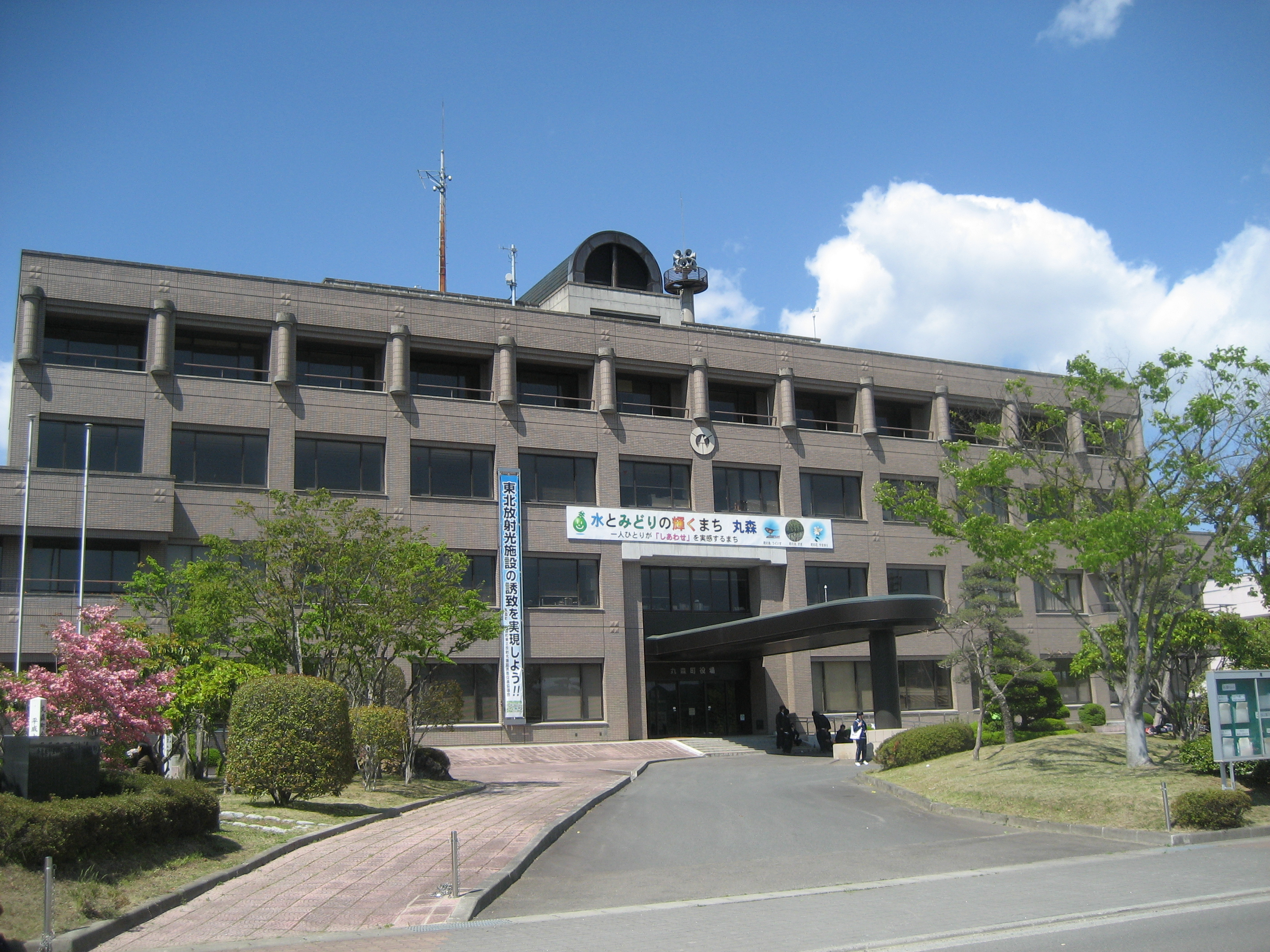 宮城県丸森町役場庁舎